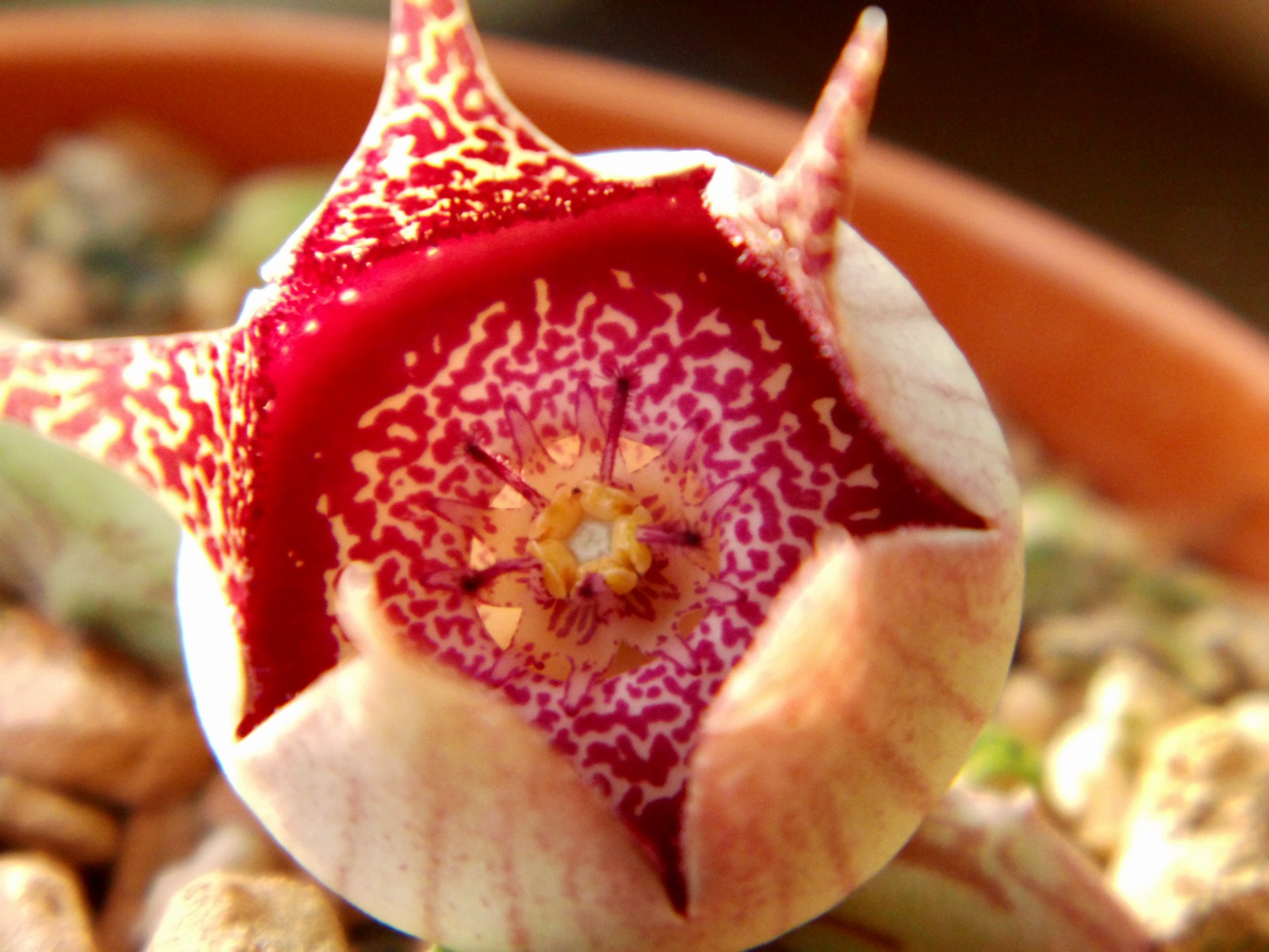 africa succulent genus Orbeanthus